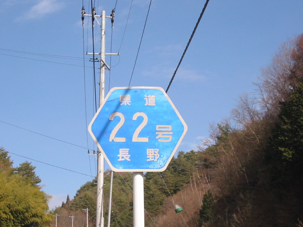 「号」入りヘキサ。全国的にも珍しい標識。